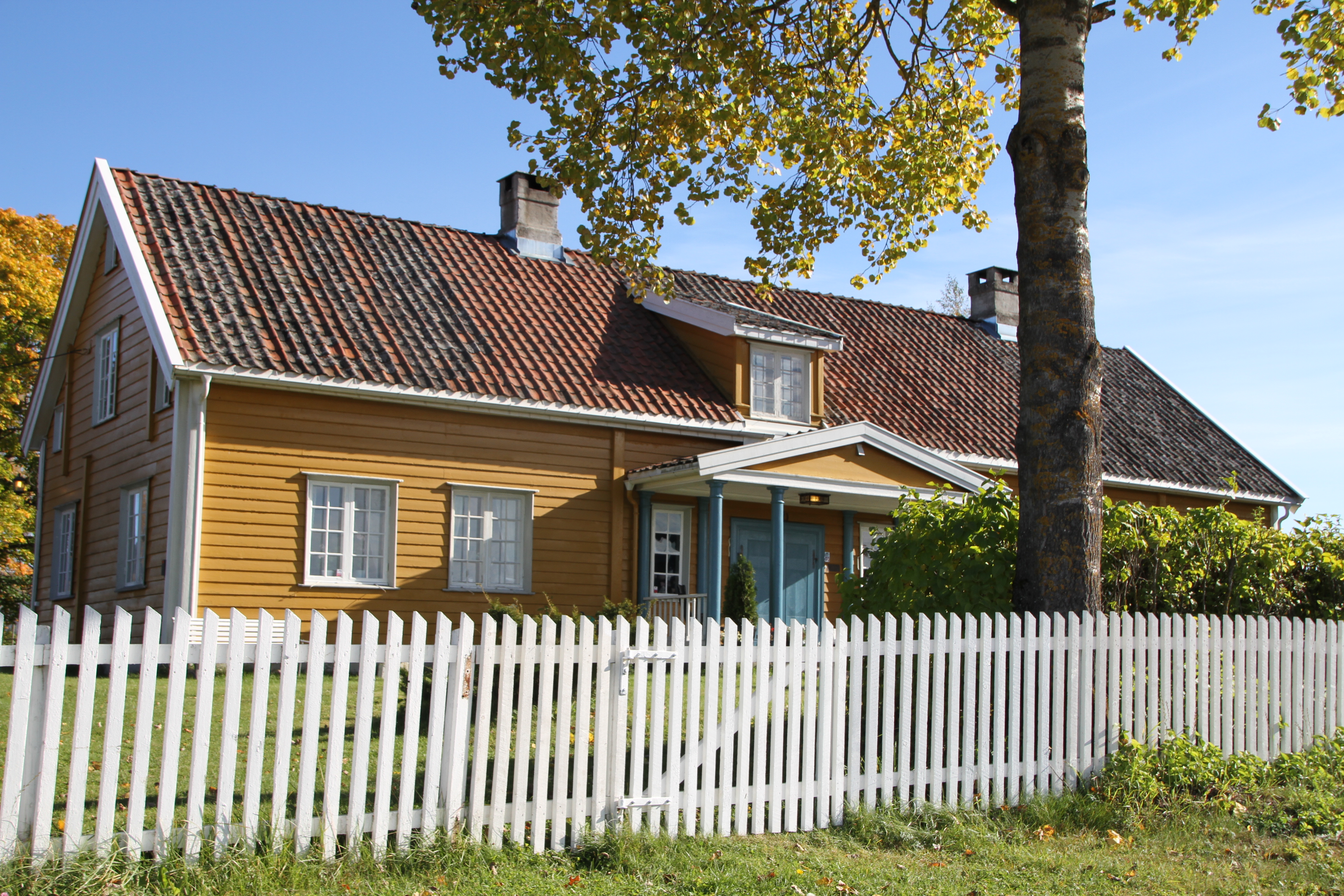 The parish manor of Gran, close to the Sister Churches, at Gran in Hadeland (Oppland county, Norway)